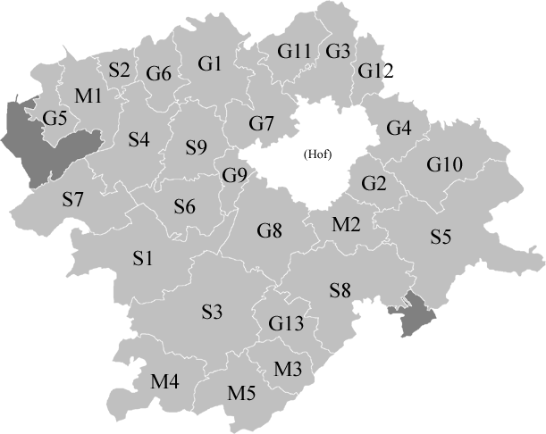 A Map of Landkreis Hof, Bayern, Germany. "S" means "Städe", S1; Helmbrechts, S2; Lichtenberg, S3; Münchberg, S4; Naila, S5; Rehau, S6; Schauenstein, S7; Schwarzenbach a.Wald, S8; Schwarzenbach a.d.Saale, S9; Selbitz. "M" means "Märkte", M1; Bad Steben, M2; Oberkotzau, M3; Sparneck, M4; Stammbach, M5; Zell. "G" means "Gemeinden", G1; Berg, G2; Döhlau, G3; Feilitzsch, G4; Gattendorf, G5; Geroldsgrün, G6; Issigau, G7; Köditz, G8; Konradsreuth, G9; Leupoldsgrün, G10; Regnitzlosau, G11; Töpen, G12; Trogen, G13; Weißdorf.